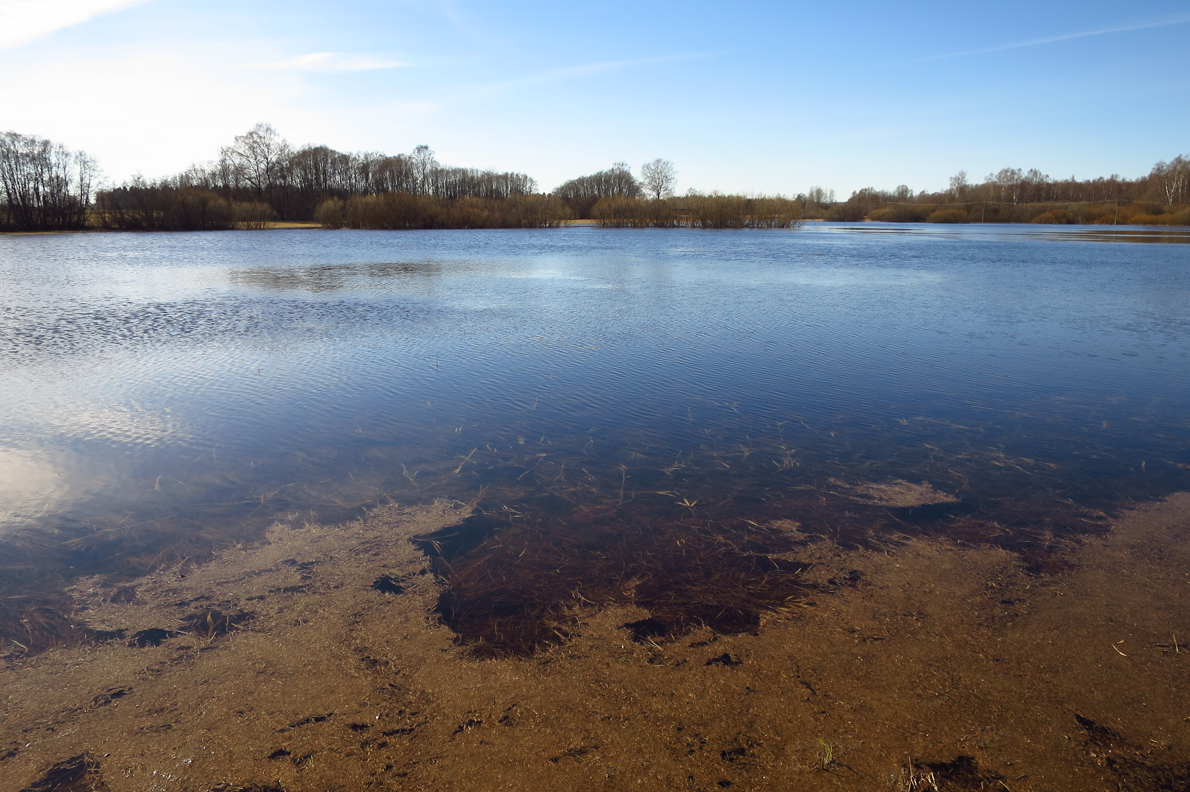 Jalgsema karstijärv kevadel